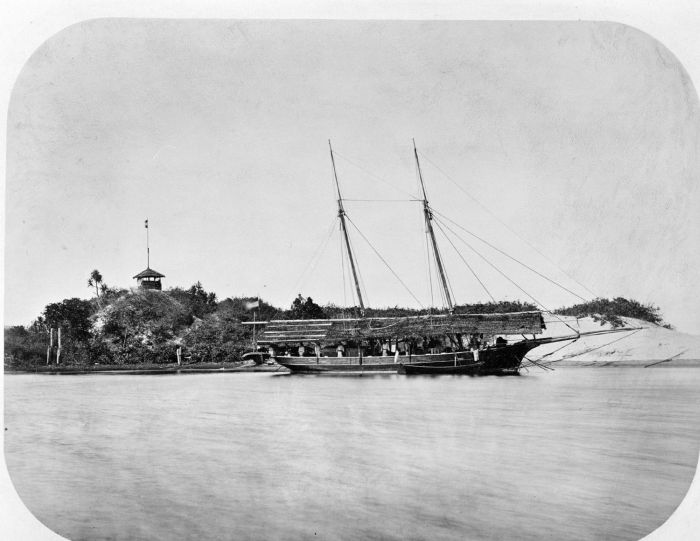 Foto. De kruiser nr. 25 ter bewaking van Koeala Kroeng-Raba in Atjeh